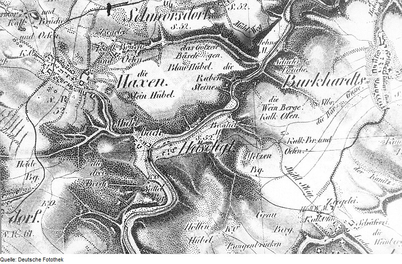 Original image description from the Deutsche Fotothek Müglitztal-Mühlbach. Oberreit, Sect. Dresden, 1821/22